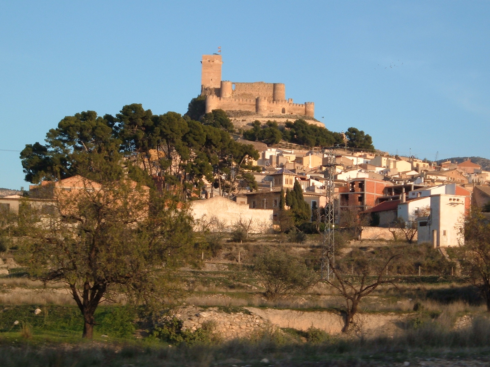 Castell de Biar des de la carretera de la Canyada.